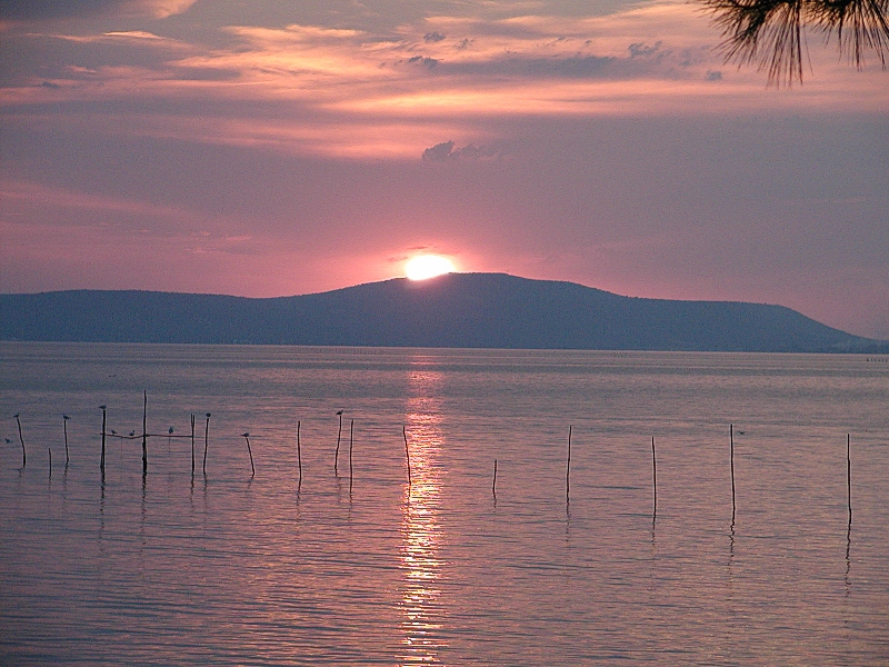 Lago di Varano Contrada Chianca (Parco Nazionale del Gargarno)